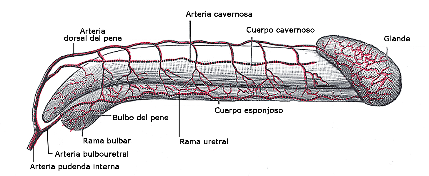 Esquema anatómico con la vascularización arterial del pene.